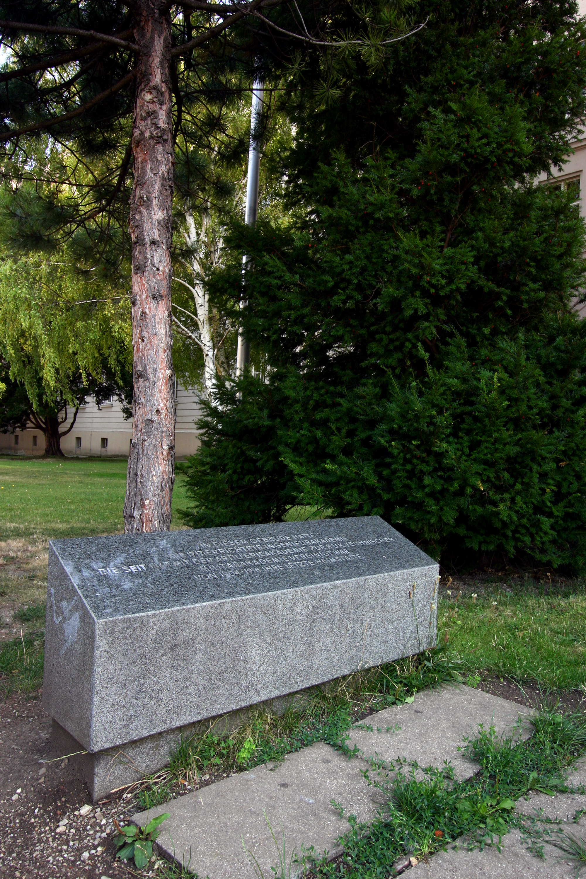 Gedenkstein vor der HTL Mödling mit der Inschrift "In diesem Gebäude hatte die 1717 errichtete Ingenieuakademie die seit 1869 mit der Artillerieakademie zur k.u.k Technischen Militärakademie vereinigt war von 1904-1918 ihre letzte Heimstätte"